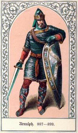 Arnulfo de Carintia